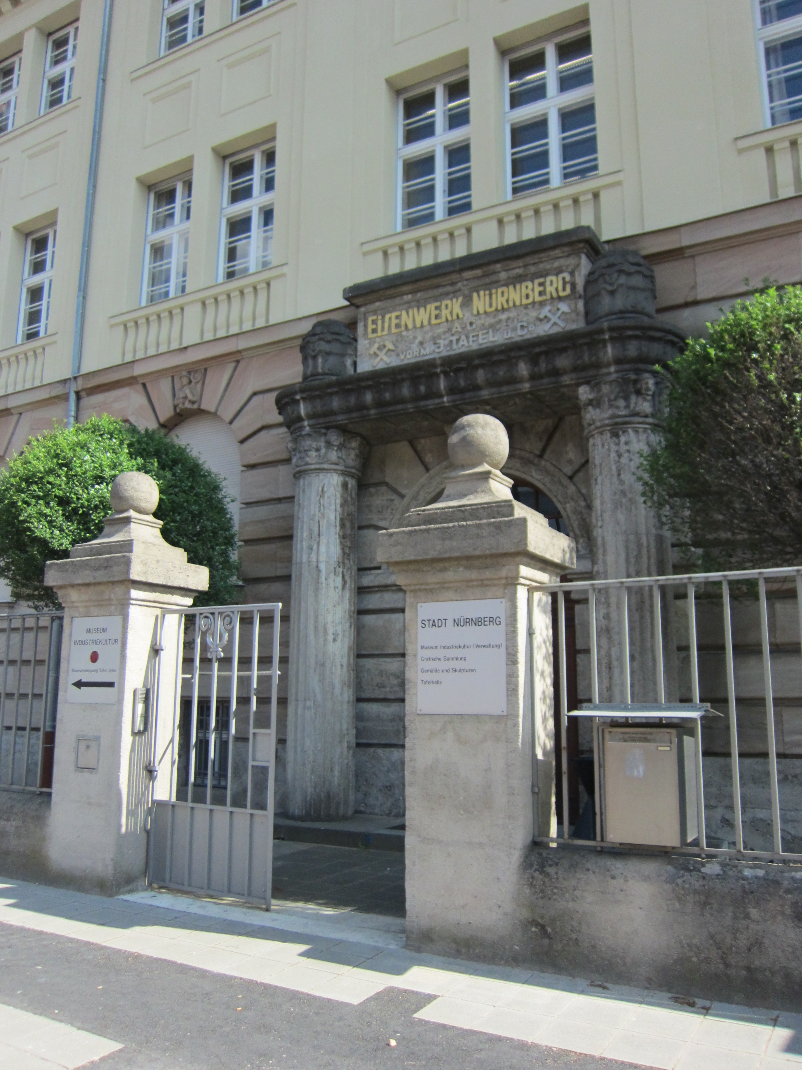 Grafische Sammlung im Eisenwerk Nürnberg (Äußere Sulzbacher Straße 60)